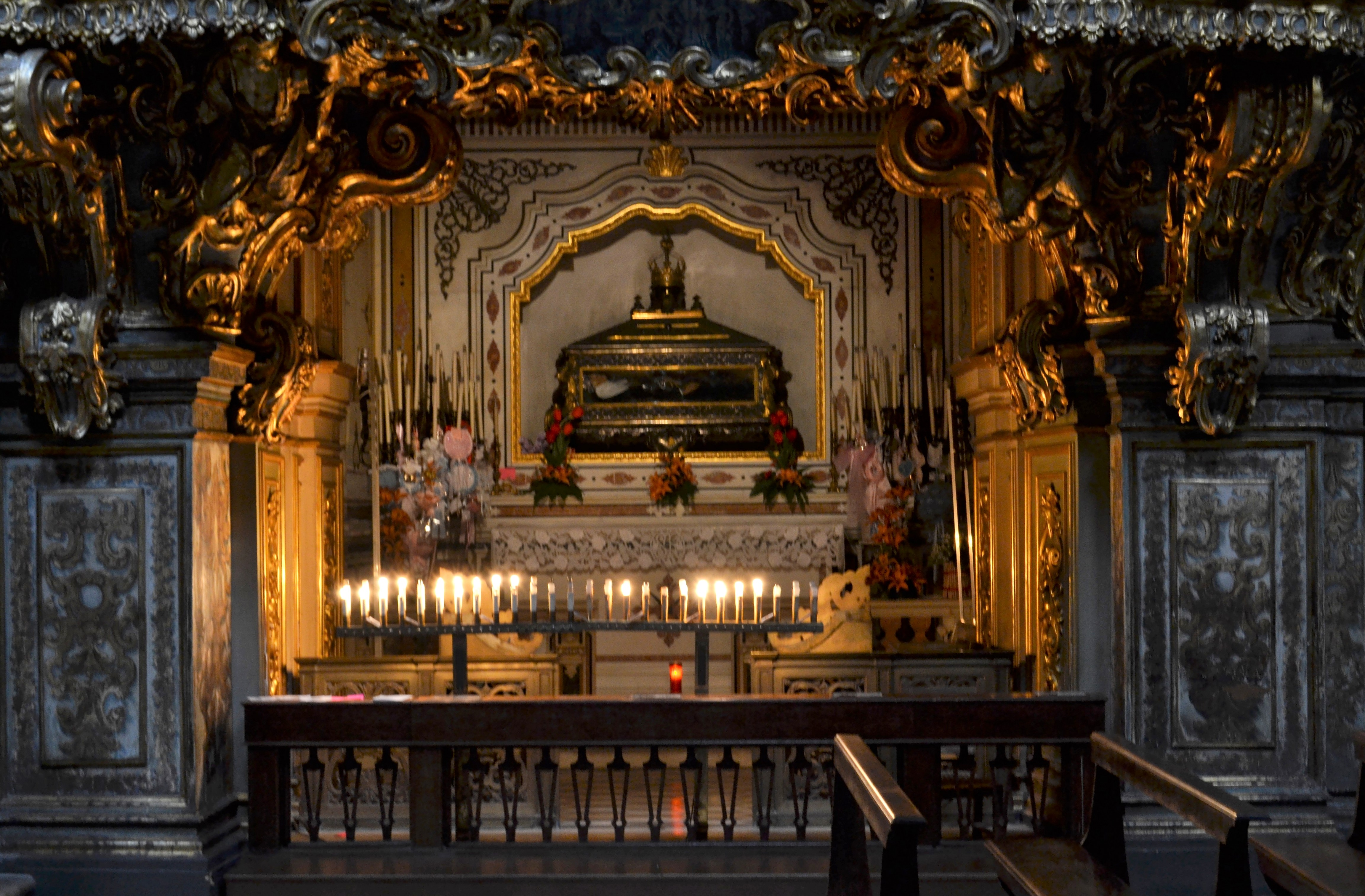 Chiesa di San Gregorio Armeno di Napoli - Quinta cappella di destra, reliquie di Santa Patrizia